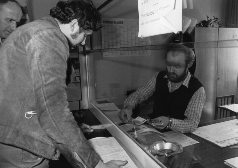 Grenzdurchgangslager Friedland Rund 2,4 Millionen Menschen fanden nach Flucht, Vertreibung, Heimkehr aus der Gefangenschaft oder Aussiedlung von 1945 bis 1975 im Grenzdurchgangslager Friedland erste Hilfe und Betreuung. Als am 8.5.1945 nach dem verlorenen II. Weltkrieg die Waffen schwiegen, wurde das im Grenzgebiet der sowjetischen, amerikanischen und britischen damaligen Besatzungszone gelegene kleine Dorf Friedland, südostwärts von Göttingen, zur Durchgangsstation für viele Menschen. Das ehemalige Versuchsgut der Universität Göttingen in Friedland war der bescheidene Ausgangspunkt für das heutige Lagerdorf mit allen notwendigen Sozialeinrichtungen und Hilfsdiensten. Auch heute noch (1982) ist Friedland für jährlich Tausende von Aussiedlern aus Osteuropa erste Anlaufstelle und Hoffnung. Im Bild: Begrüßungsgabe und Überbrückungsgeld - eine kleine Hilfe zum neuen Start